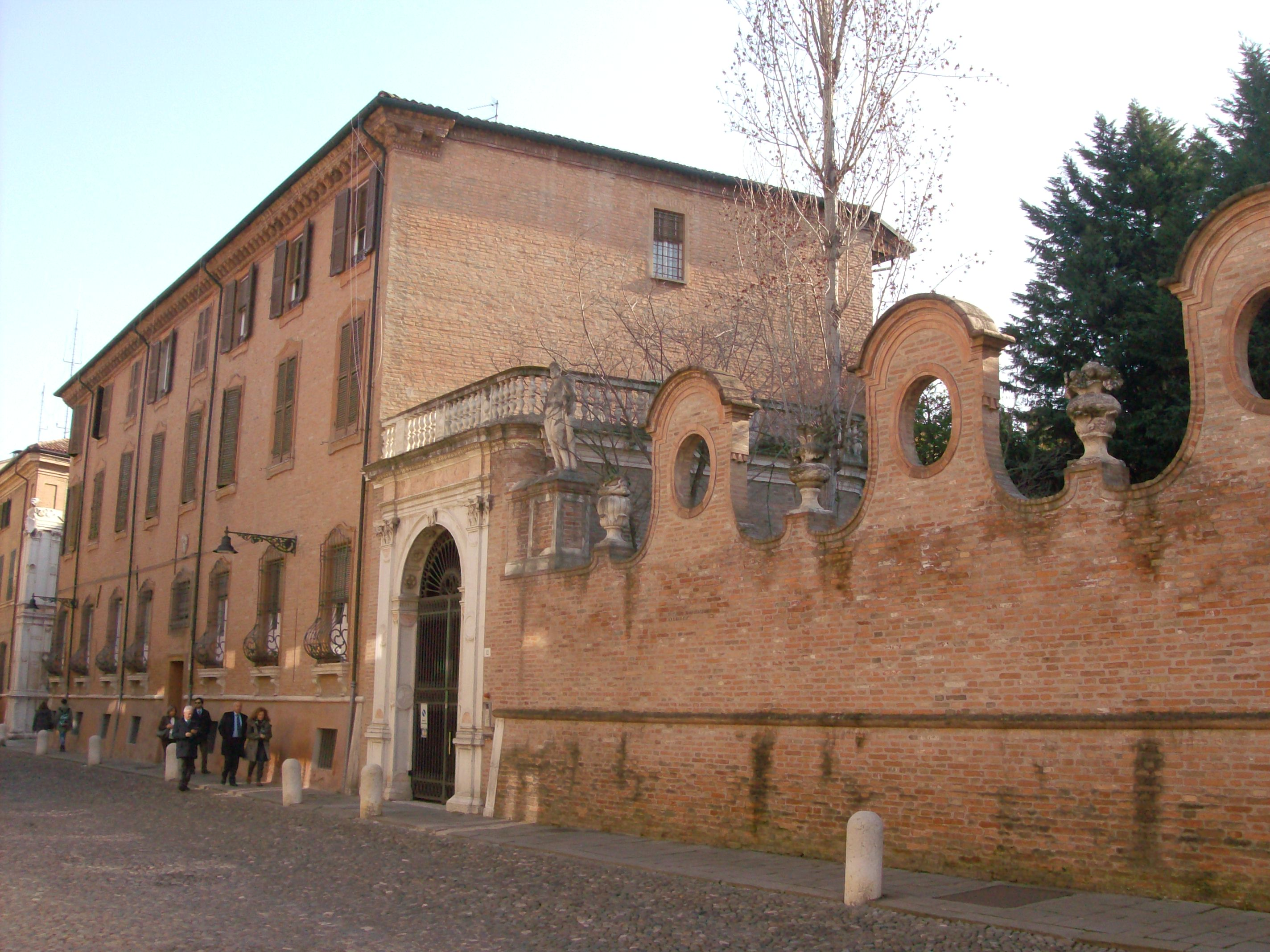 Palazzo Giglioli Varano a Ferrara